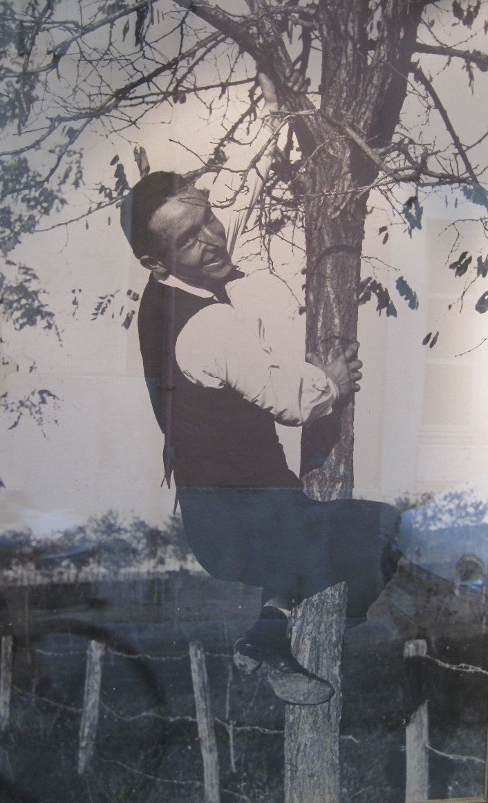 Fortunato Depero - Autoritratto su un albero (1915) - Immagine esposta in Via Portici, a Rovereto (Trento) accanto alla Casa Depero